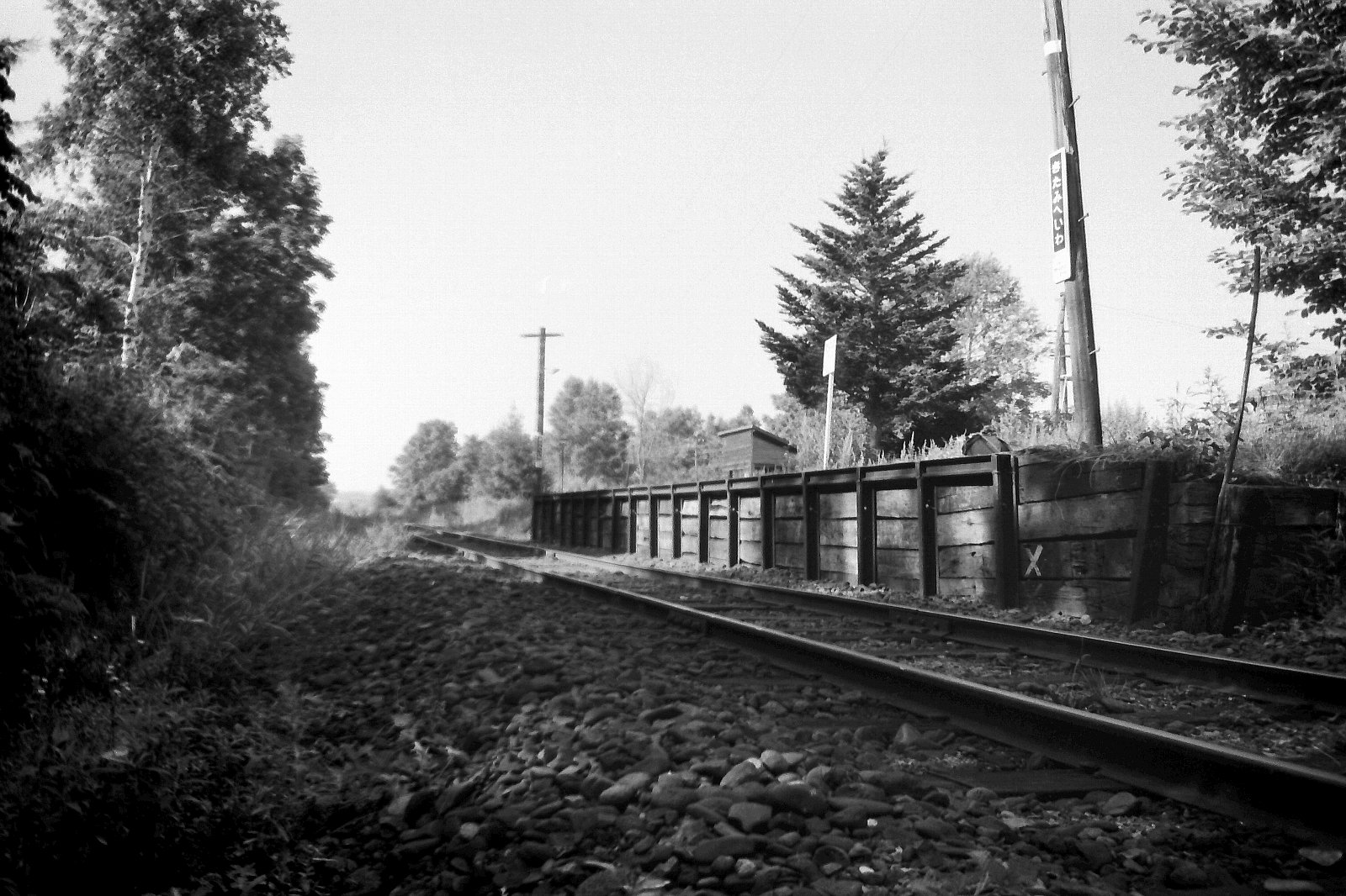 北見平和駅ホームは片側1面のみのホーム